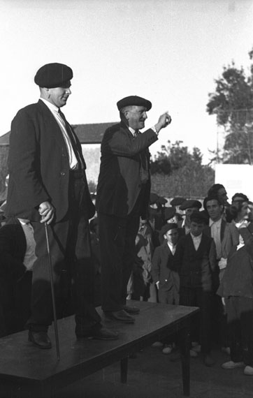 Larralde eta Hiriart bertsolariak, Sara, 1936